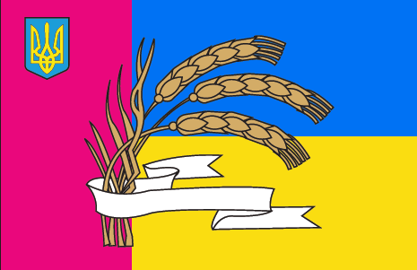 Прапор Жашківського району